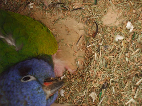 Schwarzohrpapagei mit Küken, frisch geschlüpft, 1–2 Tage alt